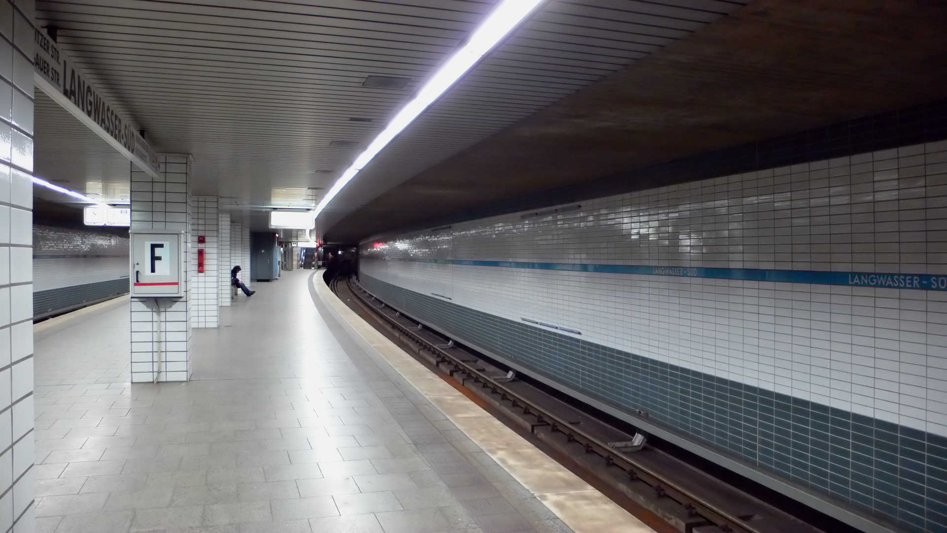 U-Bahnhof Langwasser Süd der U-Bahn Nürnberg, Bahnsteigebene, Blick von Nordwesten